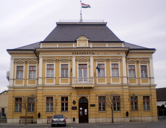 Újfehértó